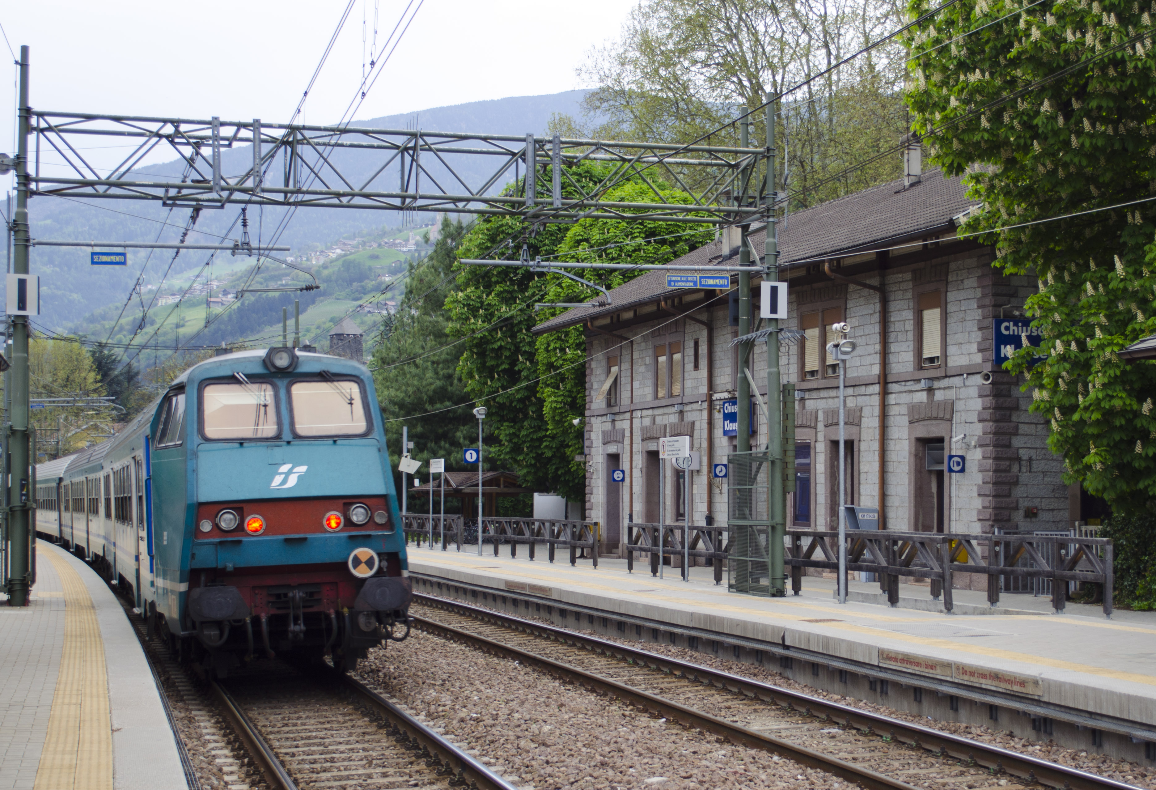 Ein Interregionalzug im Bahnhof Klausen